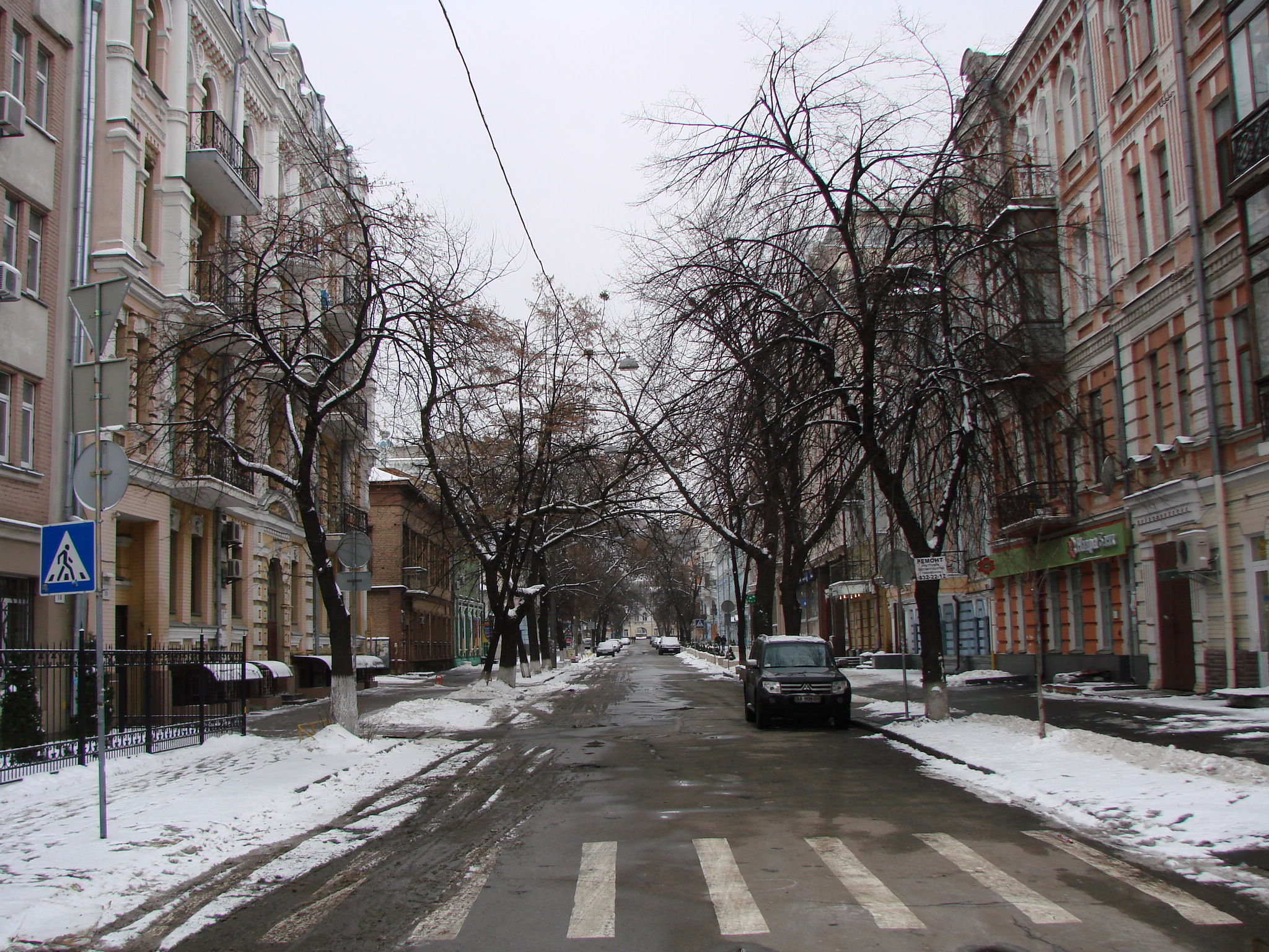 Борисоглібська вулиця у Києві